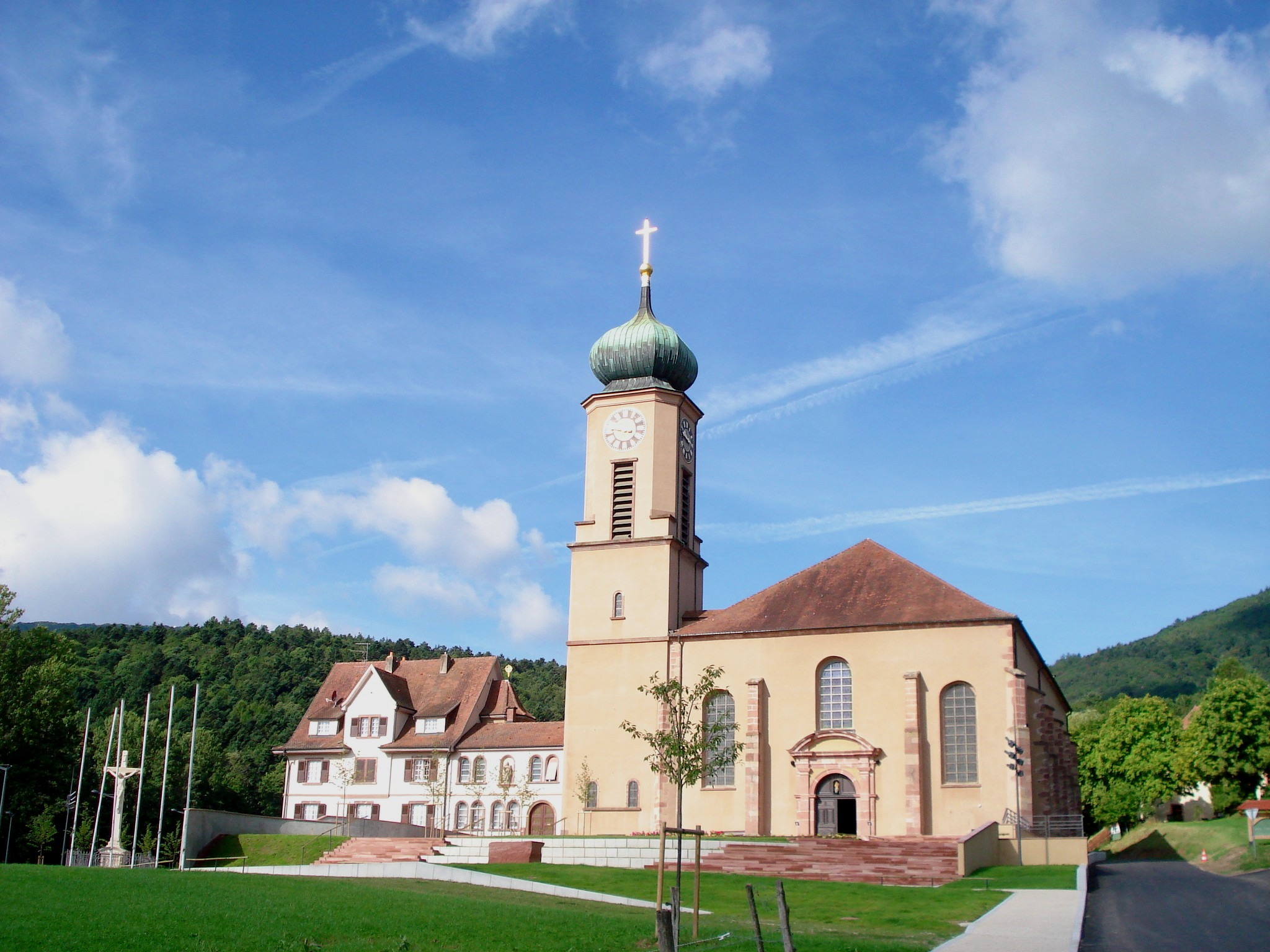 Thierenbach : Basilique vue d'ensemble devant parvis